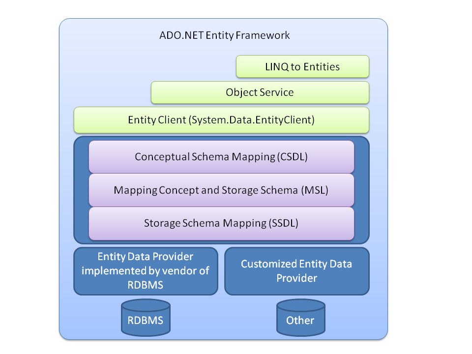 Entity Framework 架構圖。